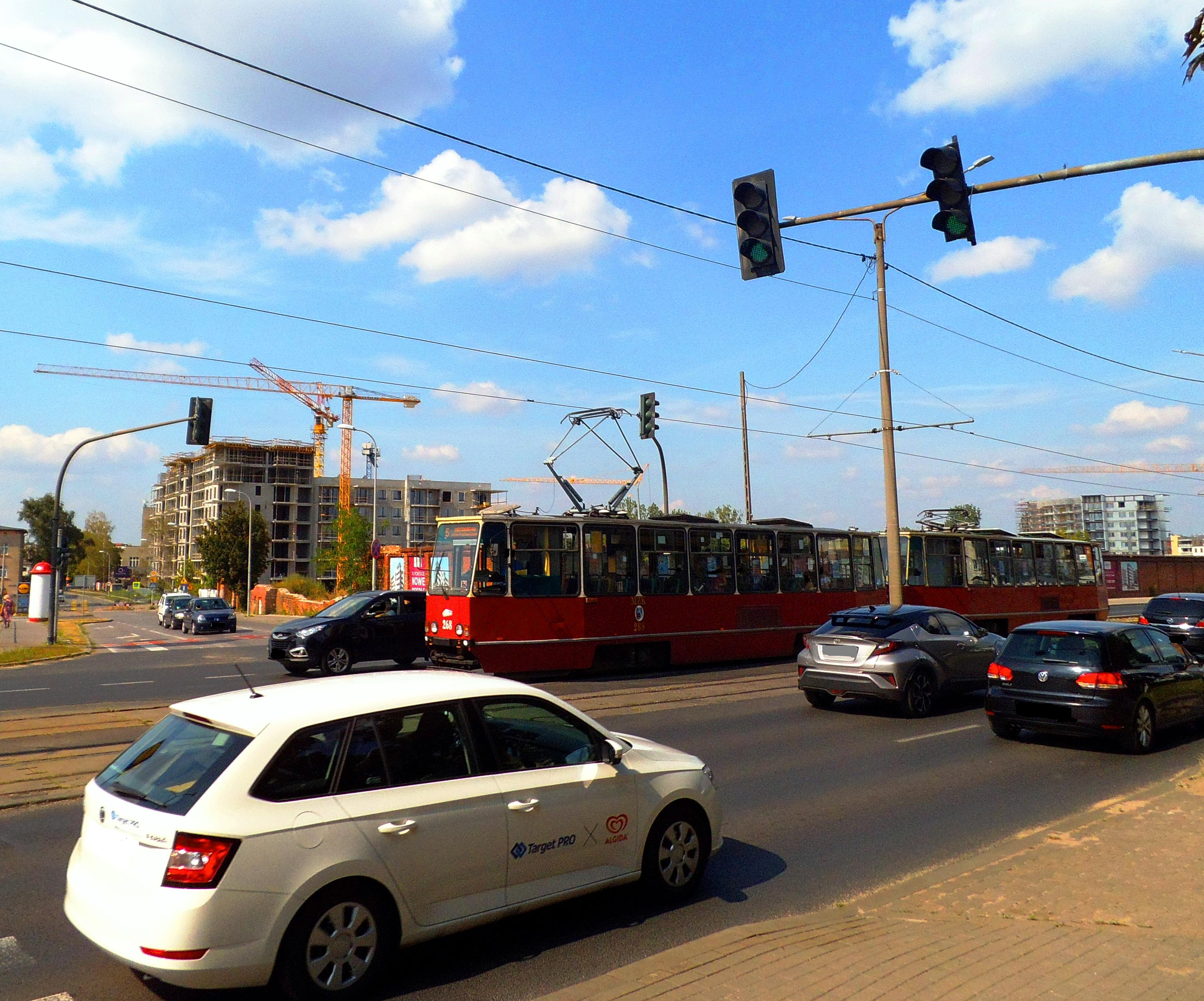 Tramwaj w Toruniu